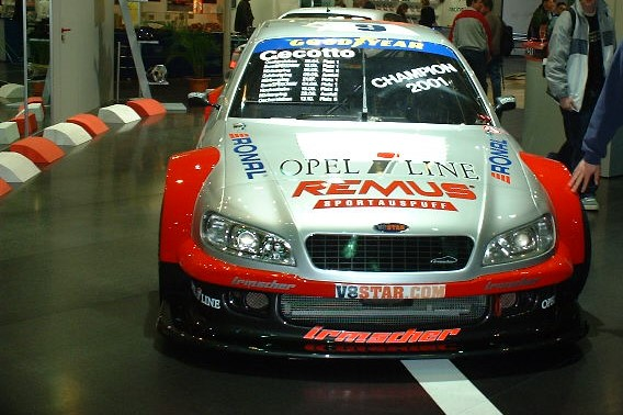 Irmscher Opel Omega V8-Star Essen Motorshow 2001